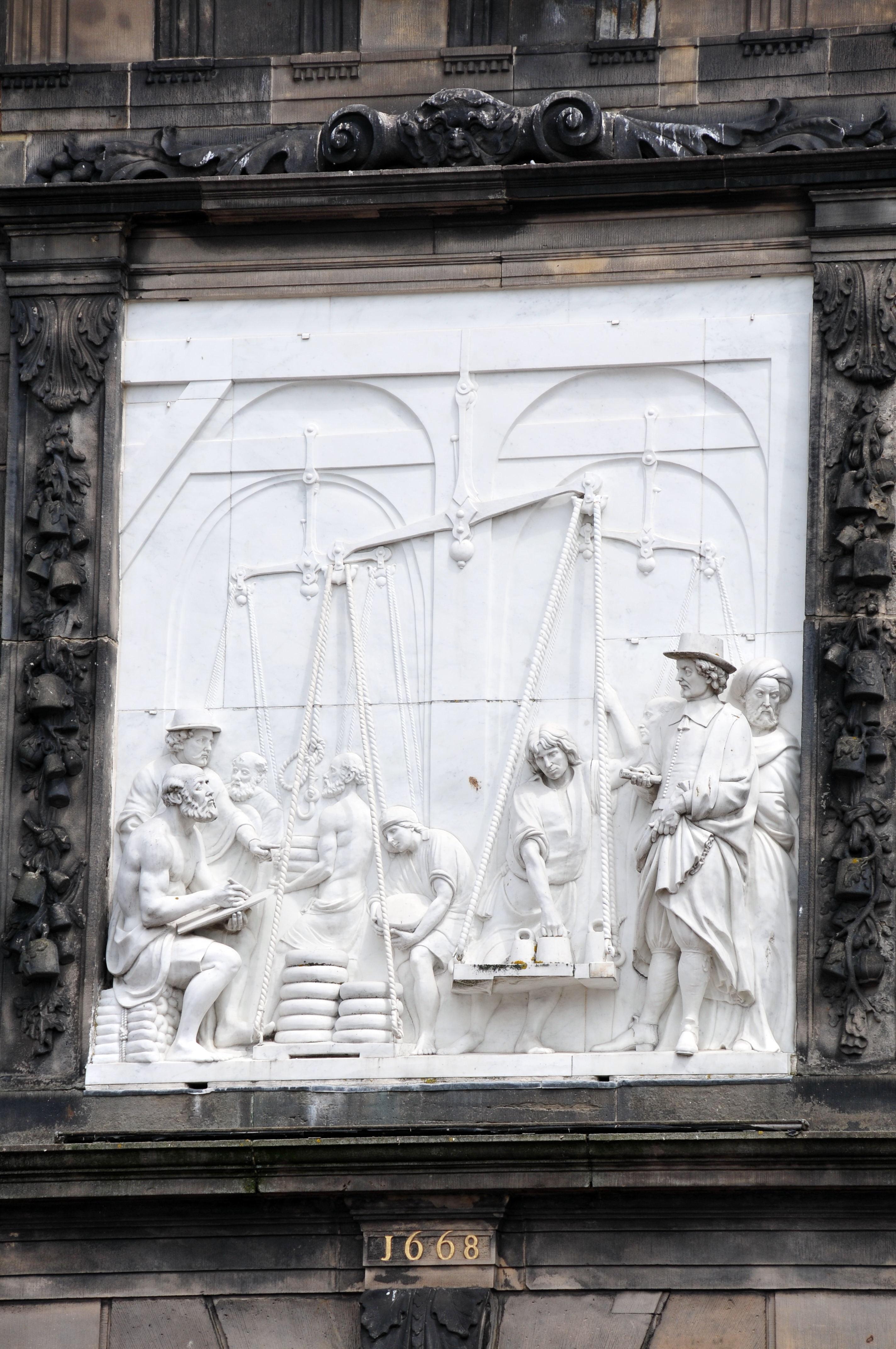 Gouda, Niederlande, Stadtzentrum